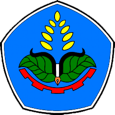 Logo Politeknik Negeri Jember